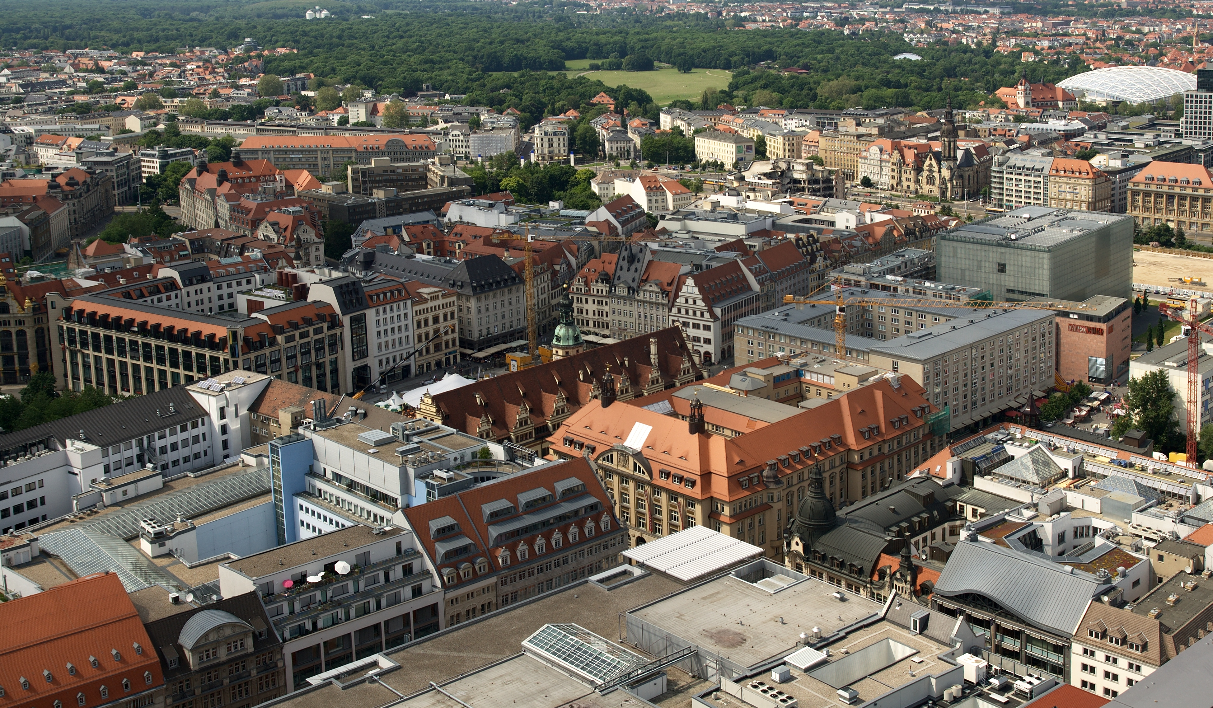 Der Markt und die Grimmaische Straße in Leipzig